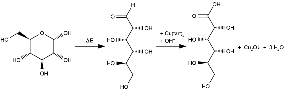 Die Reaktion bei der Fehling-Probe mit D-Glucose.